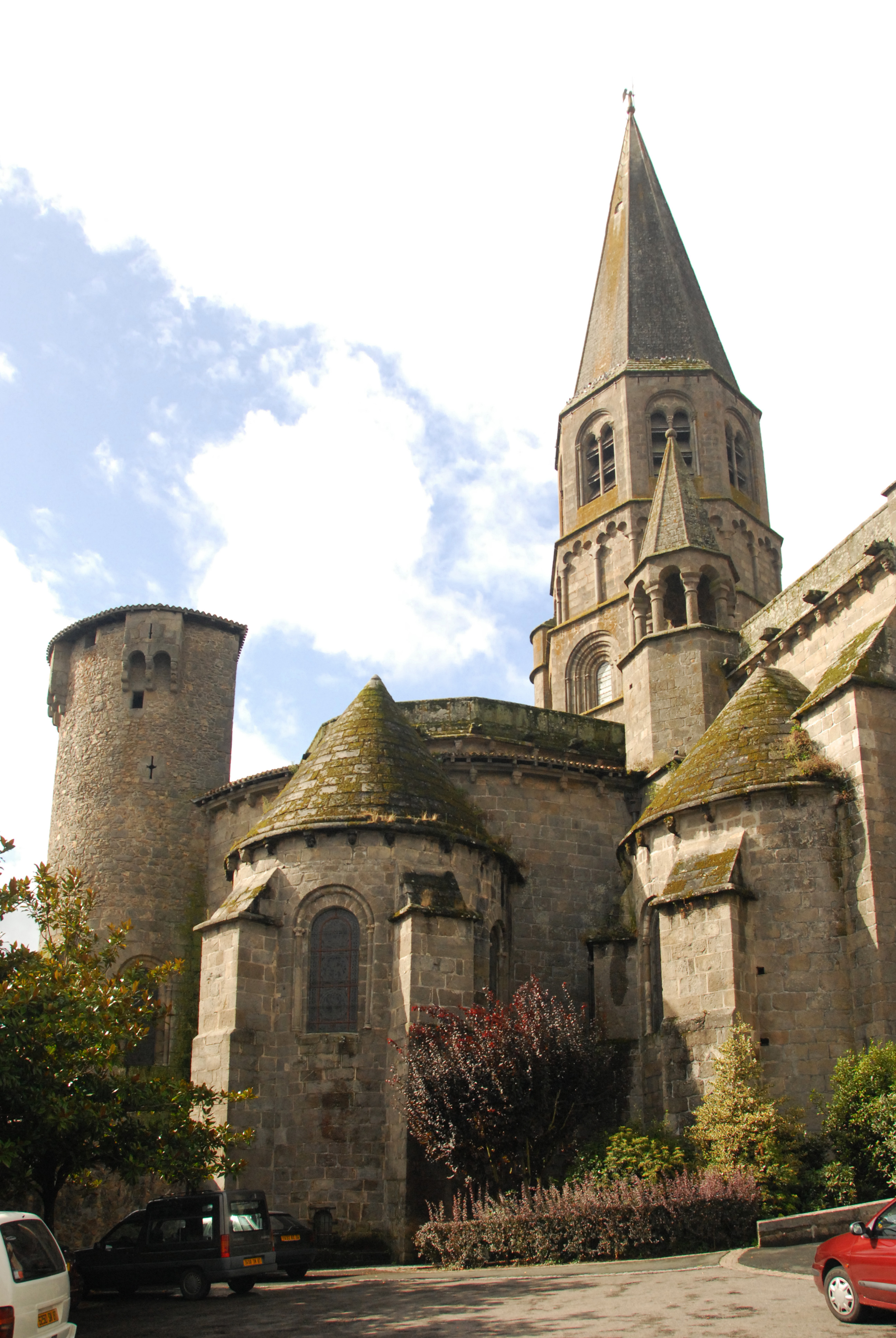 St-Pierre de Le Dorat, Chorhaupt u. Glockenturm von N